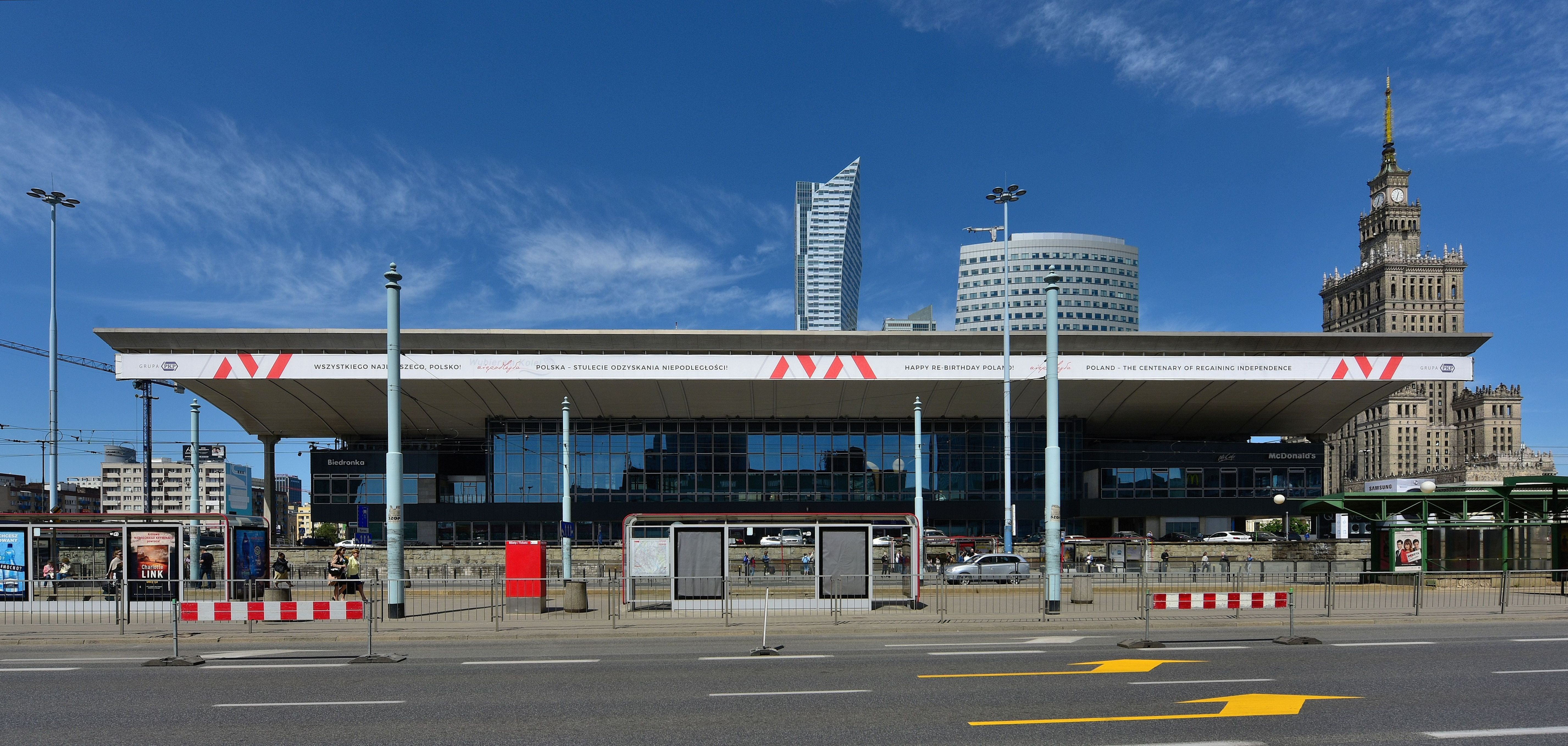 Dworzec Centralny w Warszawie, widok od strony Alej Jerozolimskich